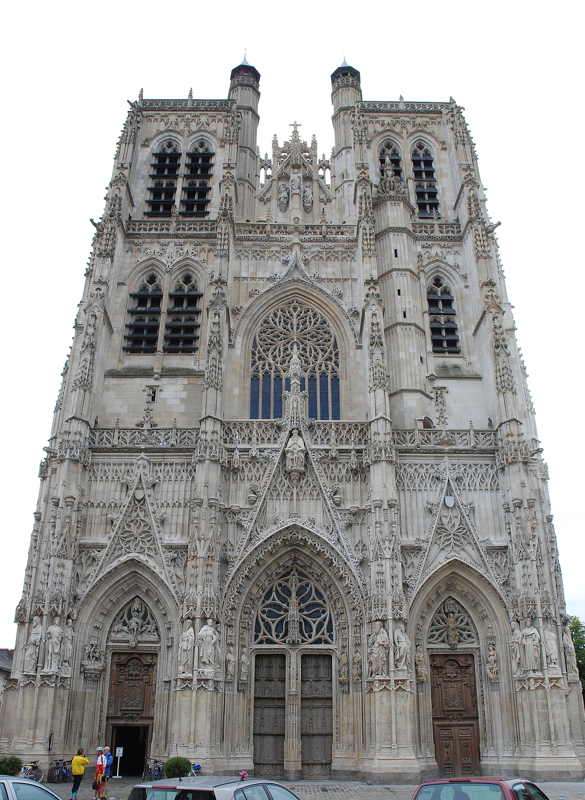 Saint-Wulfran à Abbeville, Picardie, France